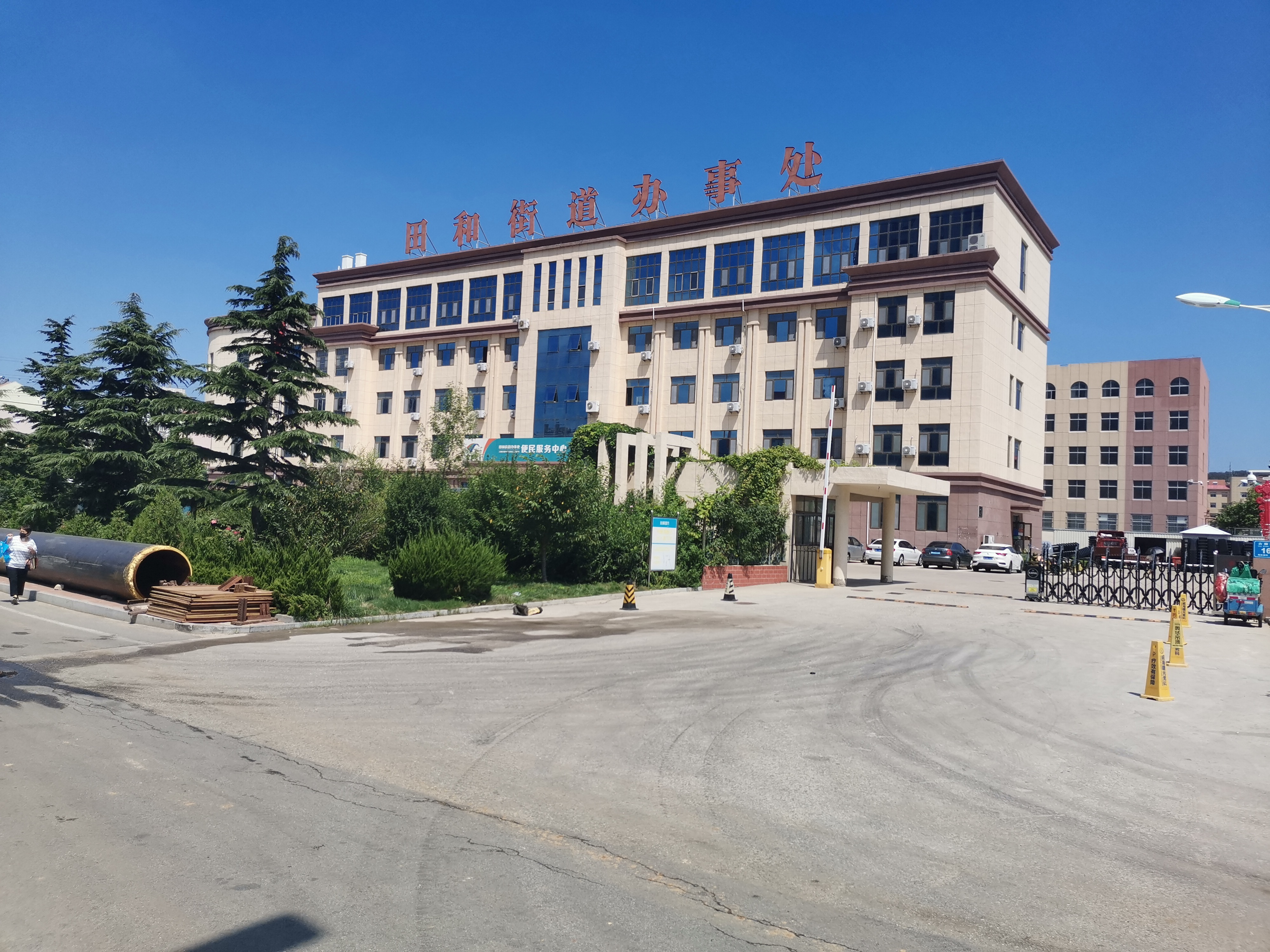 中文（中国大陆）: 田和街道2020年7月28日拍摄